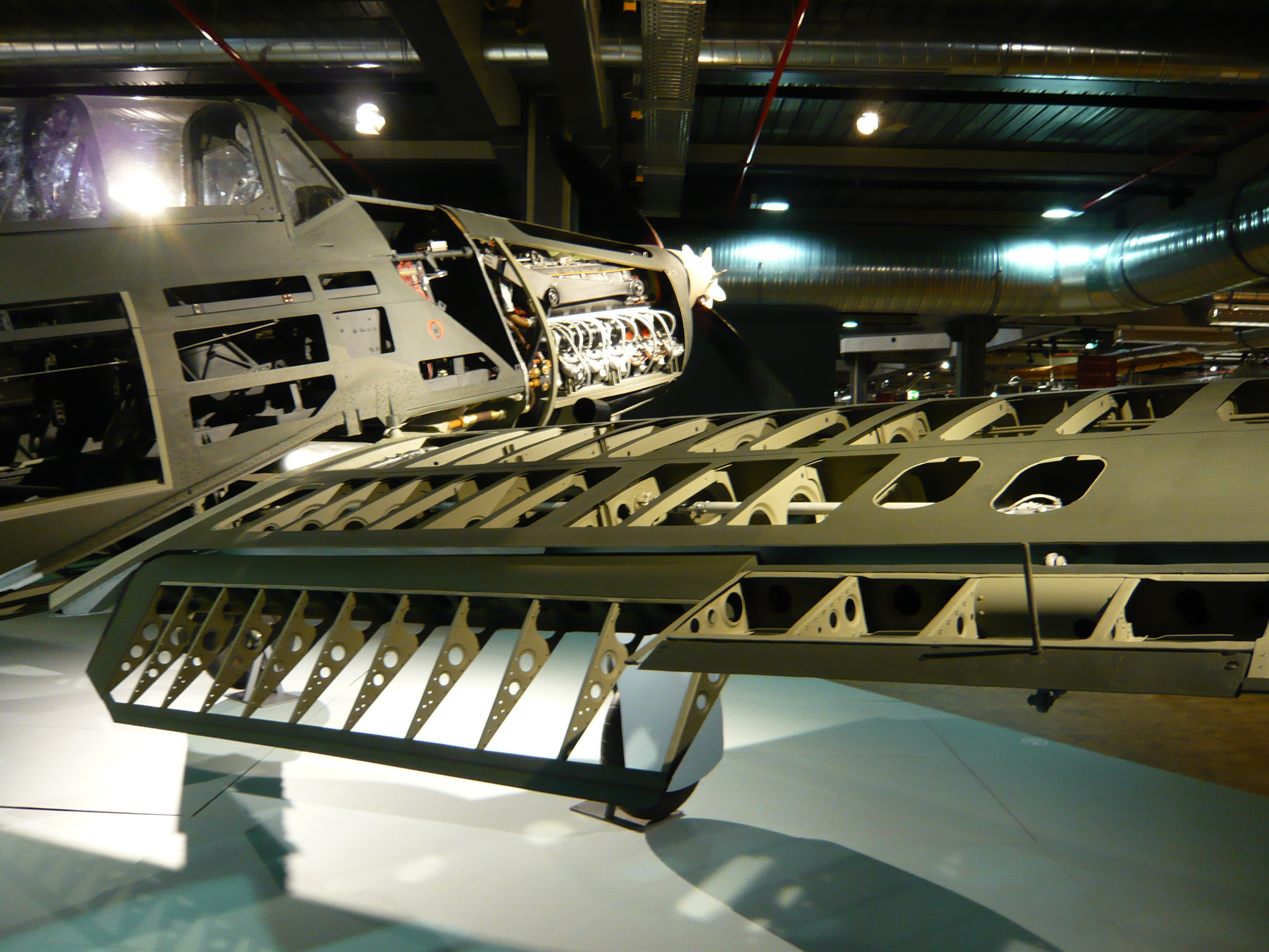 Arado Ar96 B1